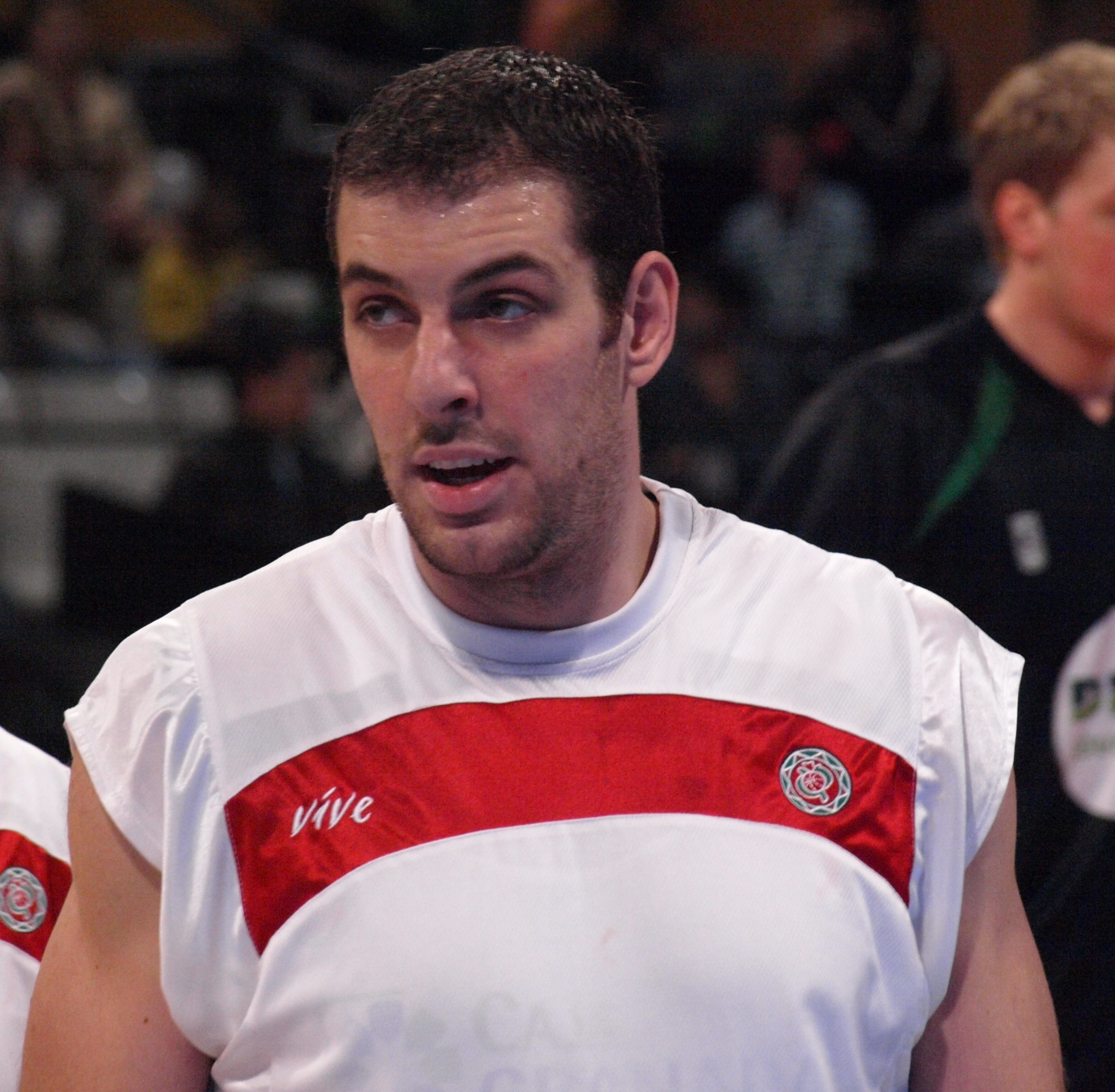 Aleks Marić en el partido de primera vuelta de la liga ACB 2008/09 disputado en Olímpico de Badalona ante el DKV Joventut.